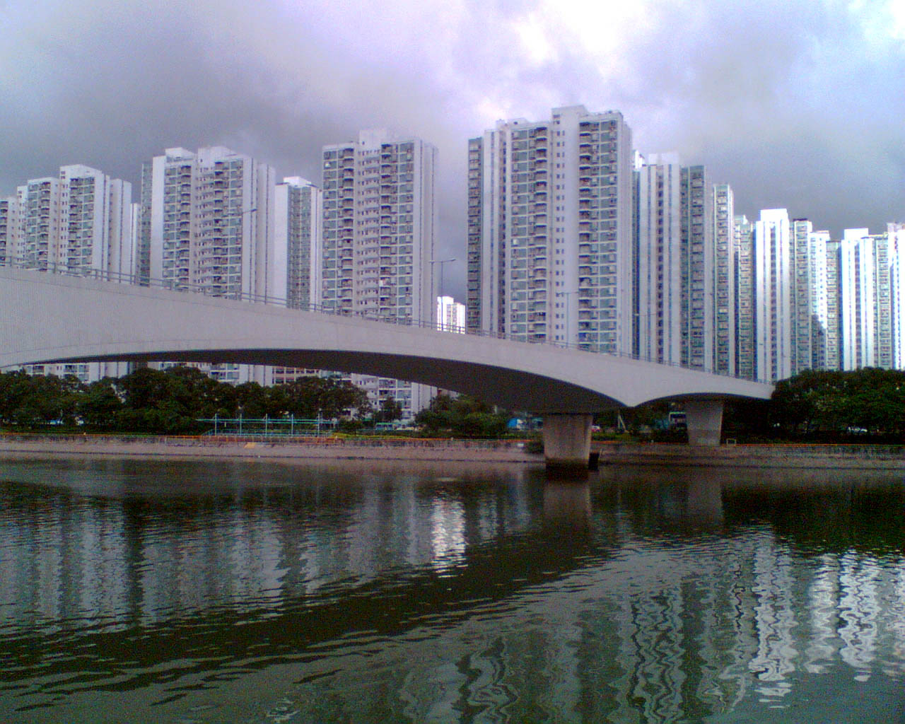 沙田第一城